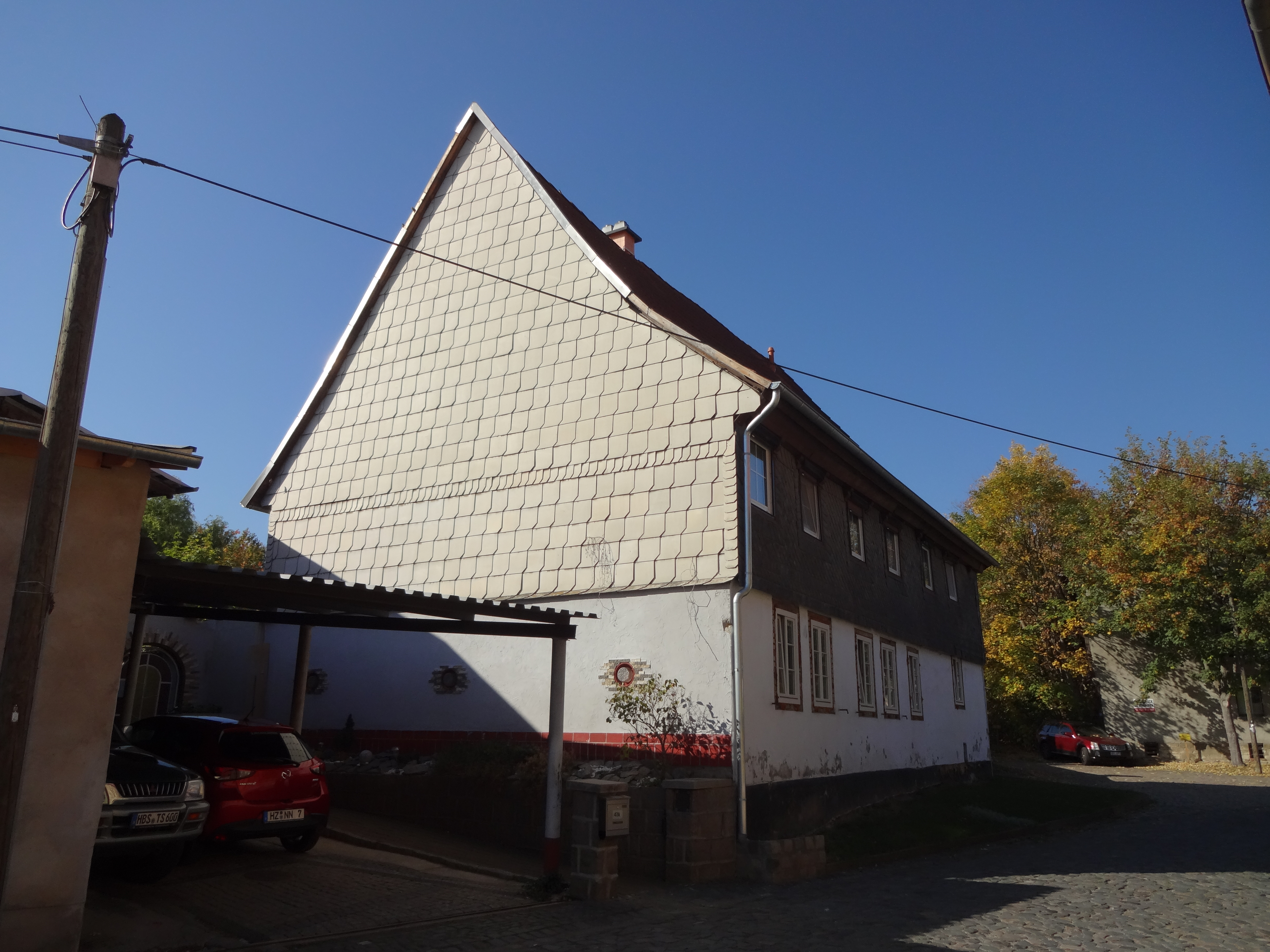 denkmalgeschütztes Bauernhaus in der Hauptstraße 47 in Zilly